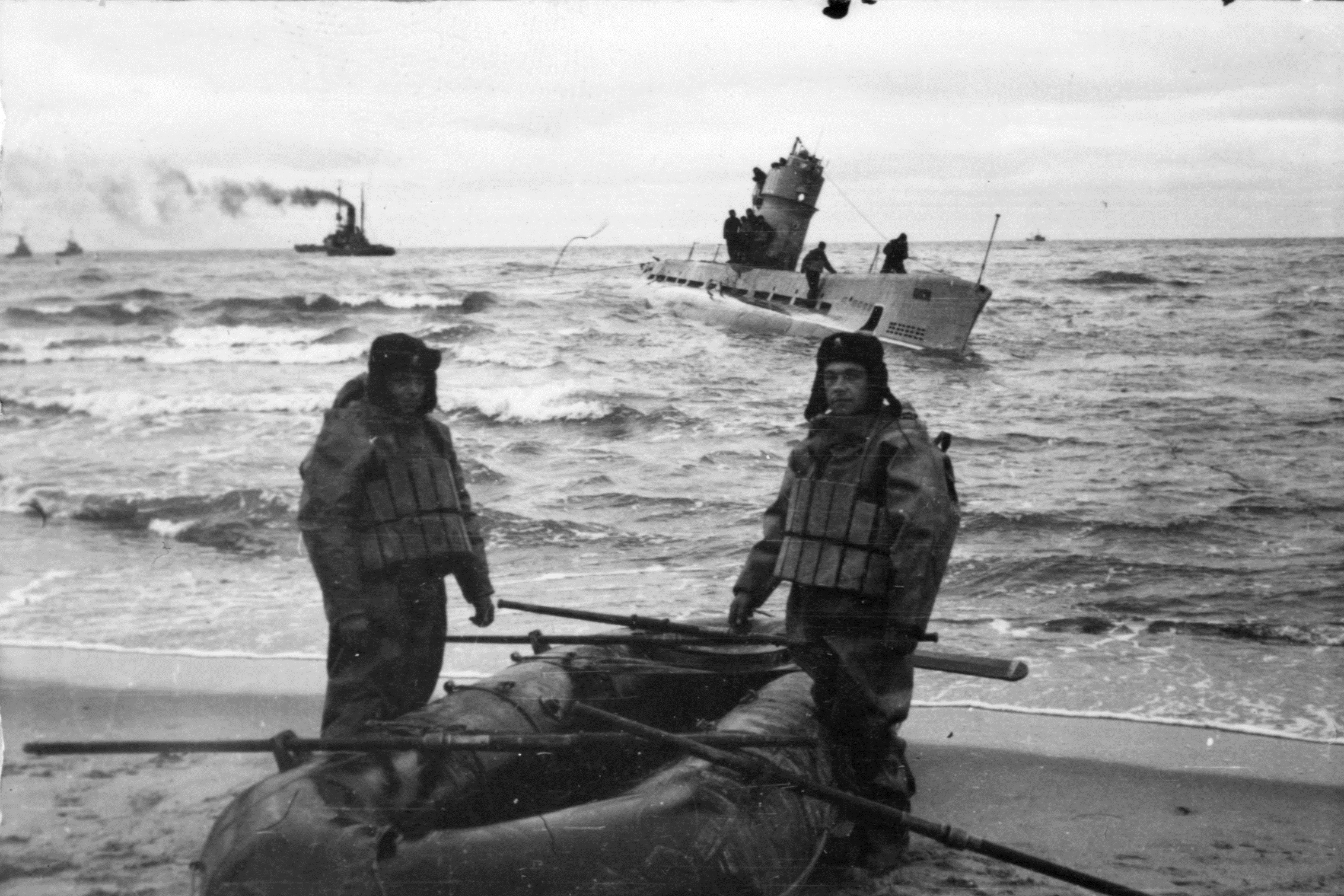 ORP Kaszub M100 w trakcie akcji ściągania z mielizny - Łysica 1957r.